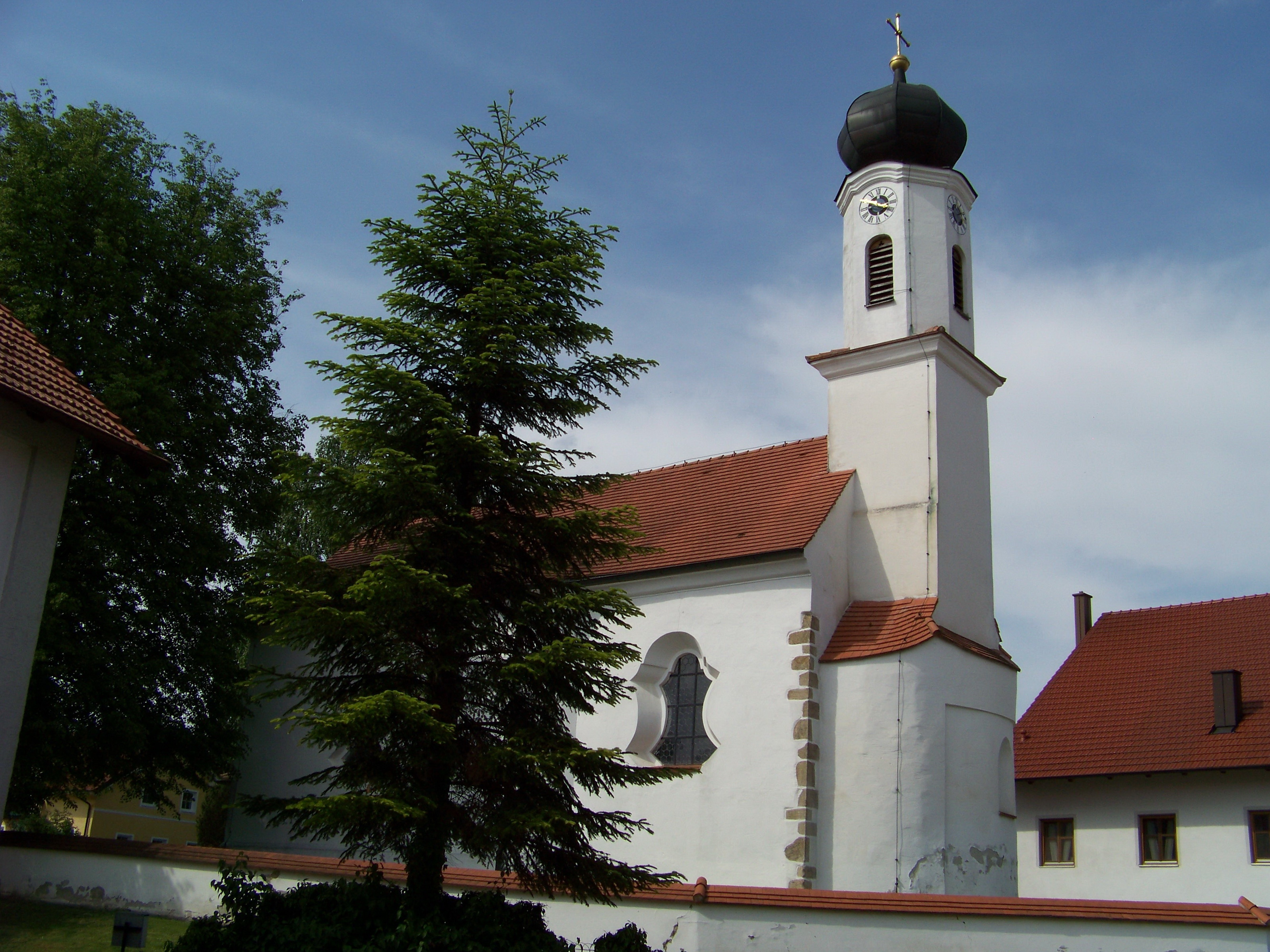 Pilsting, Kapellenstraße 4. Katholische Filialkirche St. Peter und Paul, Saalbau mit Ostturm, das ehem. romanische Langhaus mit Apsis aus dem 12. Jahrhundert als Chor adaptiert, Langhaus-Neubau nach Plänen von Johann Georg Hirschstetter 1750/52; mit Ausstattung.